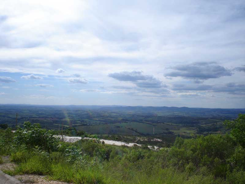 Cidade de São Thomé das Letras-MG Vista lá de cima. Foto retirada por mim em visita à cidade em 22/01/2006.